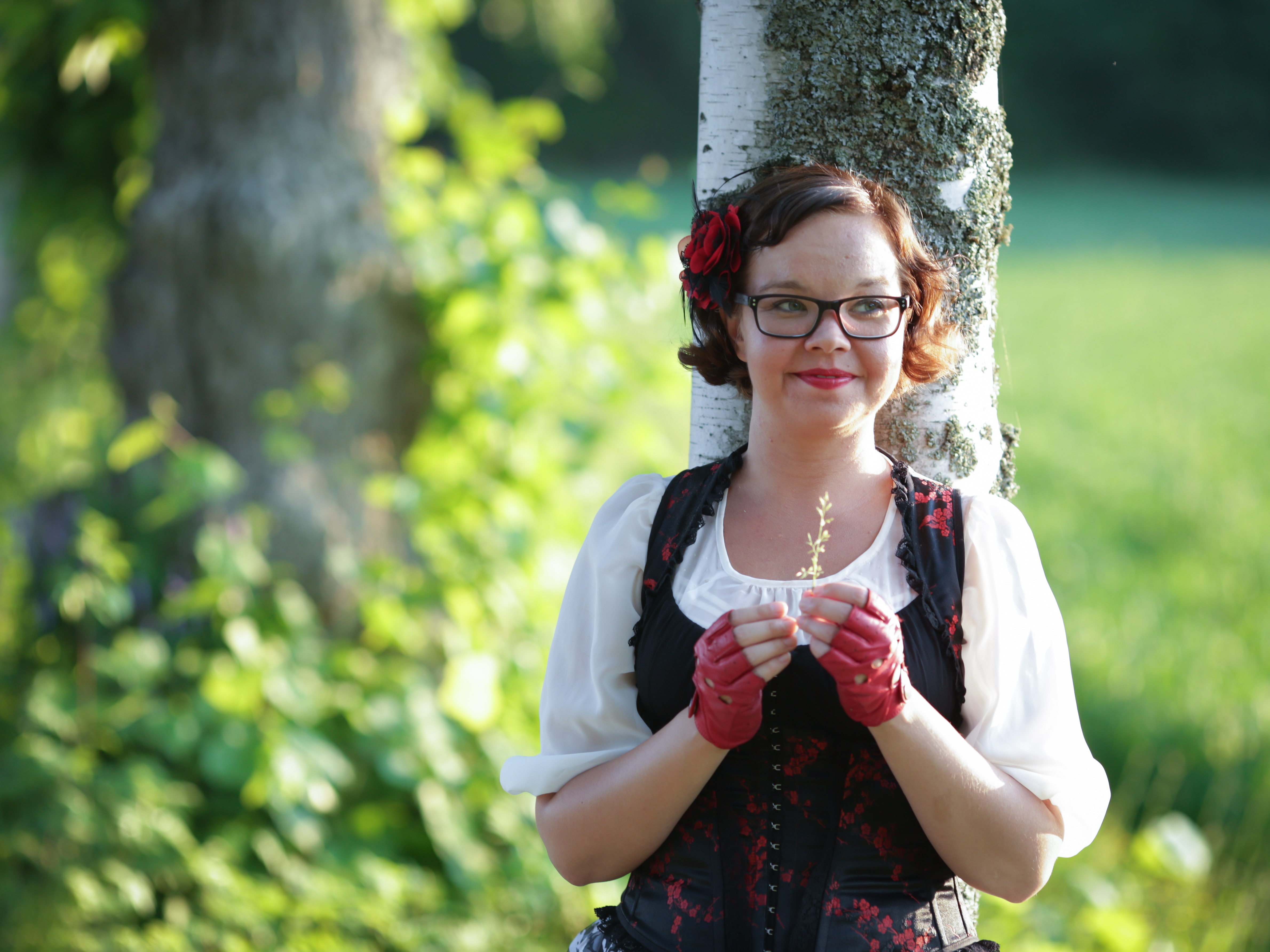 Salla Simukka kesällä 2014, valokuvaaja Lars Kastilan